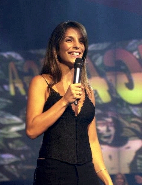 Foto de meu arquivo pessoal de shows de Ivete Sangalo. Ivete durante show em Natal, RN.